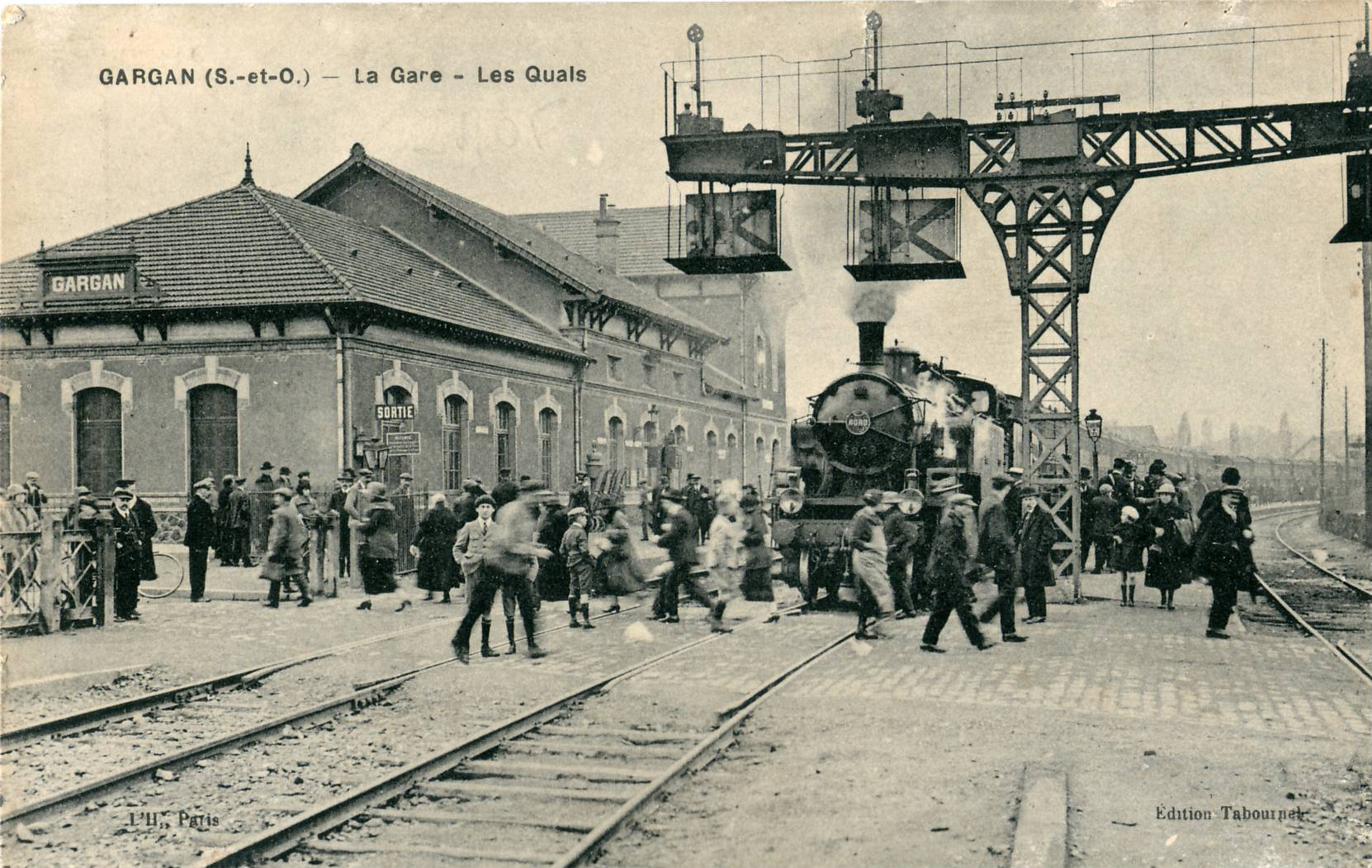 Carte postale ancienne éditée par l'H à Paris :GARGAN - La Gare - Les Quais